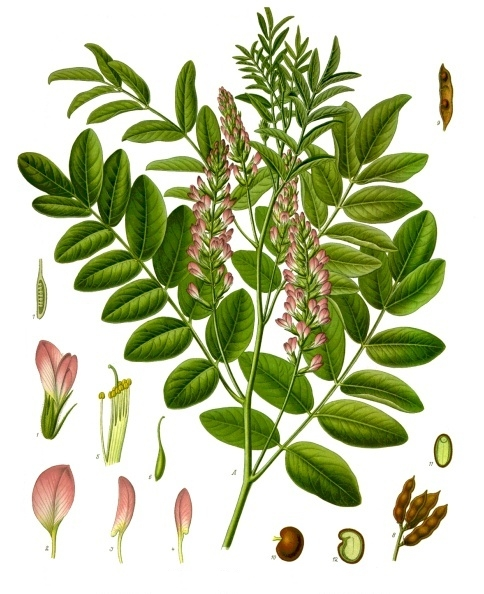 Süßholz. A oberer Theil der blühenden Pflanze, natürl. Grösse; 1 Blüthe, vergrössert; 2, 3, 4 Kronentheile, desgl.; 5 Staubgefässe mit dem Griffel, desgl.; 6 Stempel, desgl.; 7 Fruchtknoten im Längsschnitt, desgl.; 8 Früchte, natürl. Grösse; 9 eine Klappe der Hülse mit Samen, desgl.; 10 Same, vergrössert; 11, 12 derselbe im Längs- und Querschnitt, desgl.